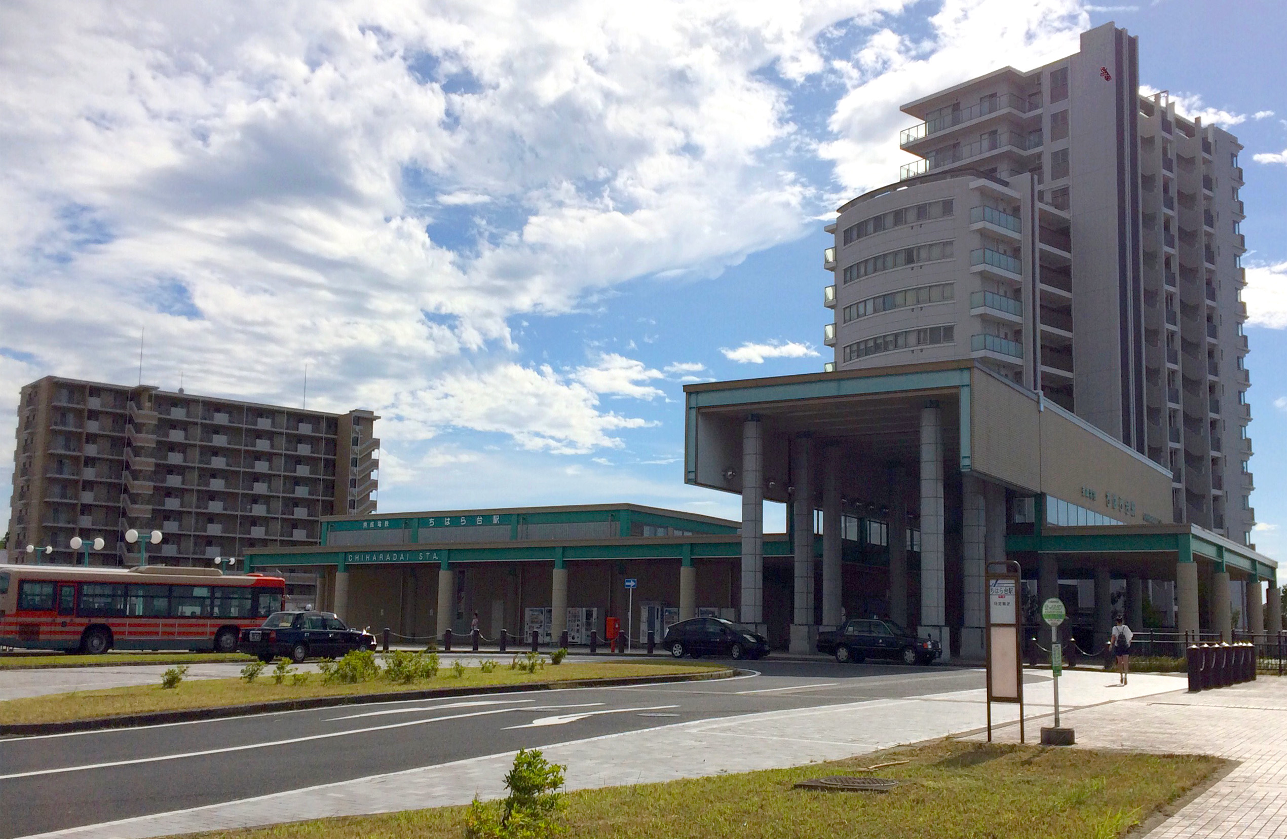 ちはら台駅舎